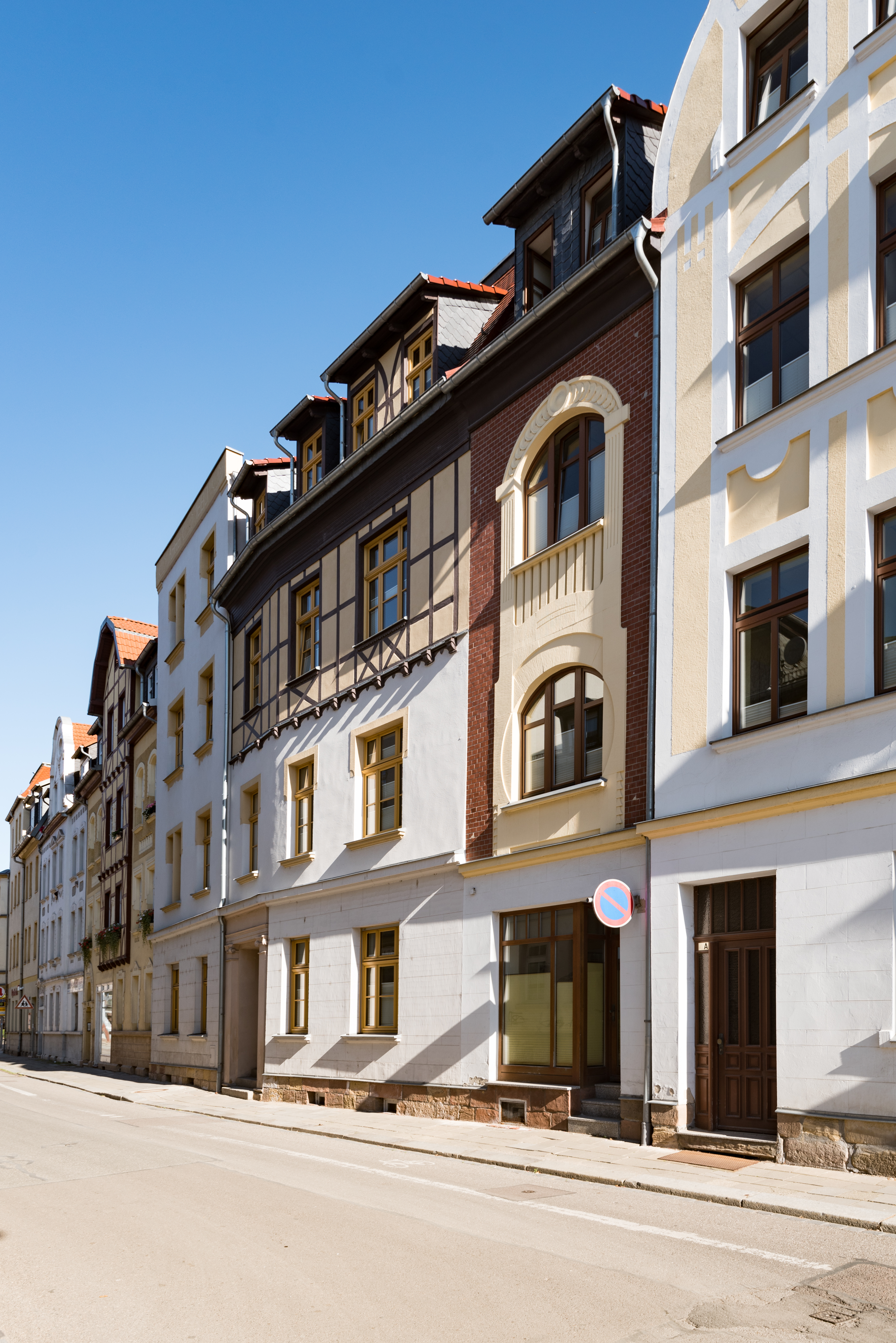 Weißenfels, Beuditzstraße 4